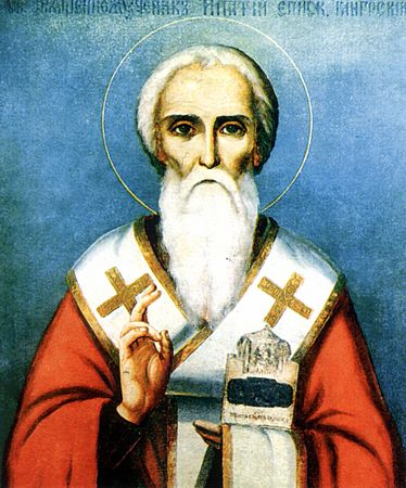 Ипатий (+326), епископ Гангрский, священномученик.